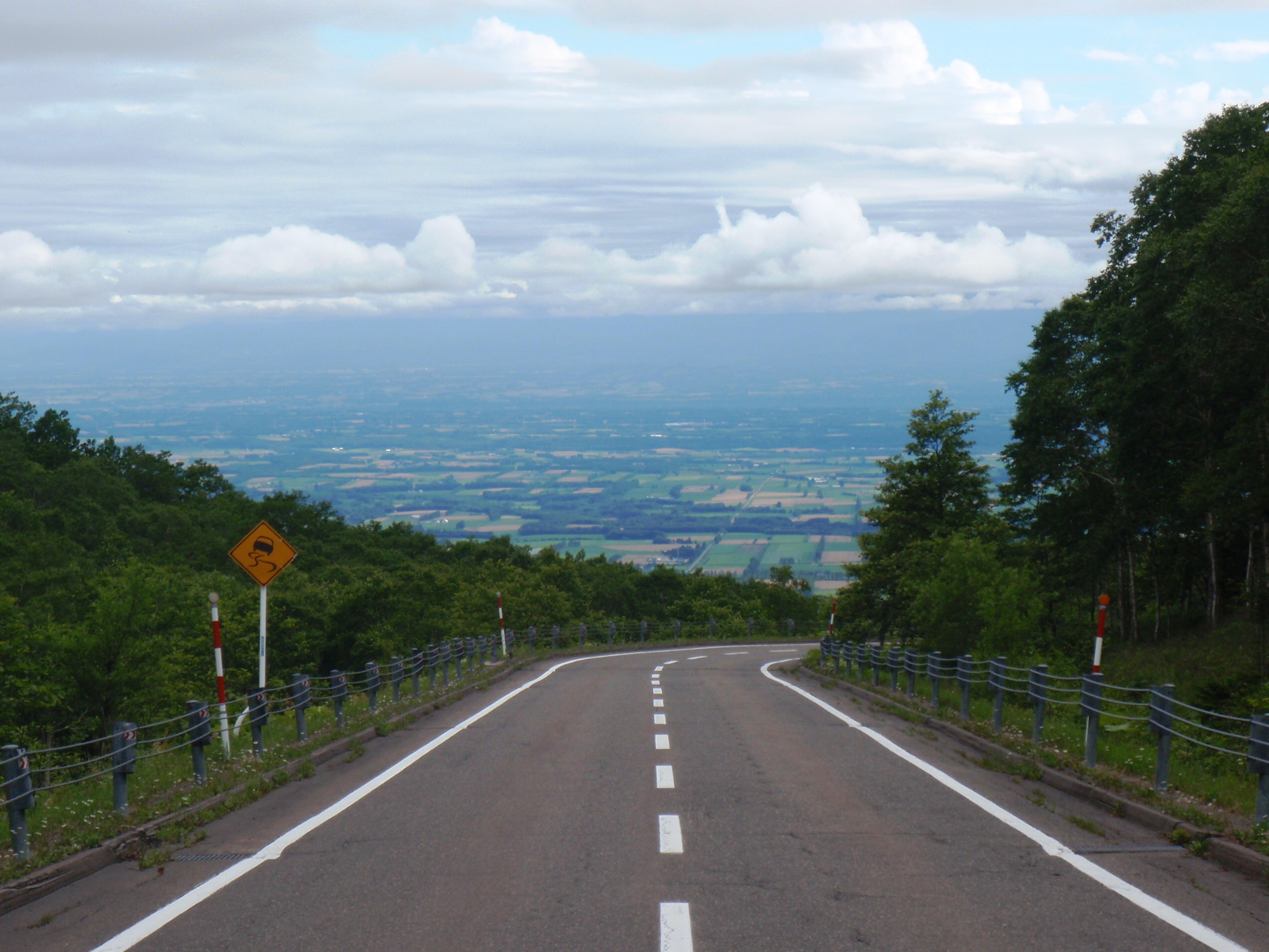 道道85号線、白樺峠から十勝平野に降りる。